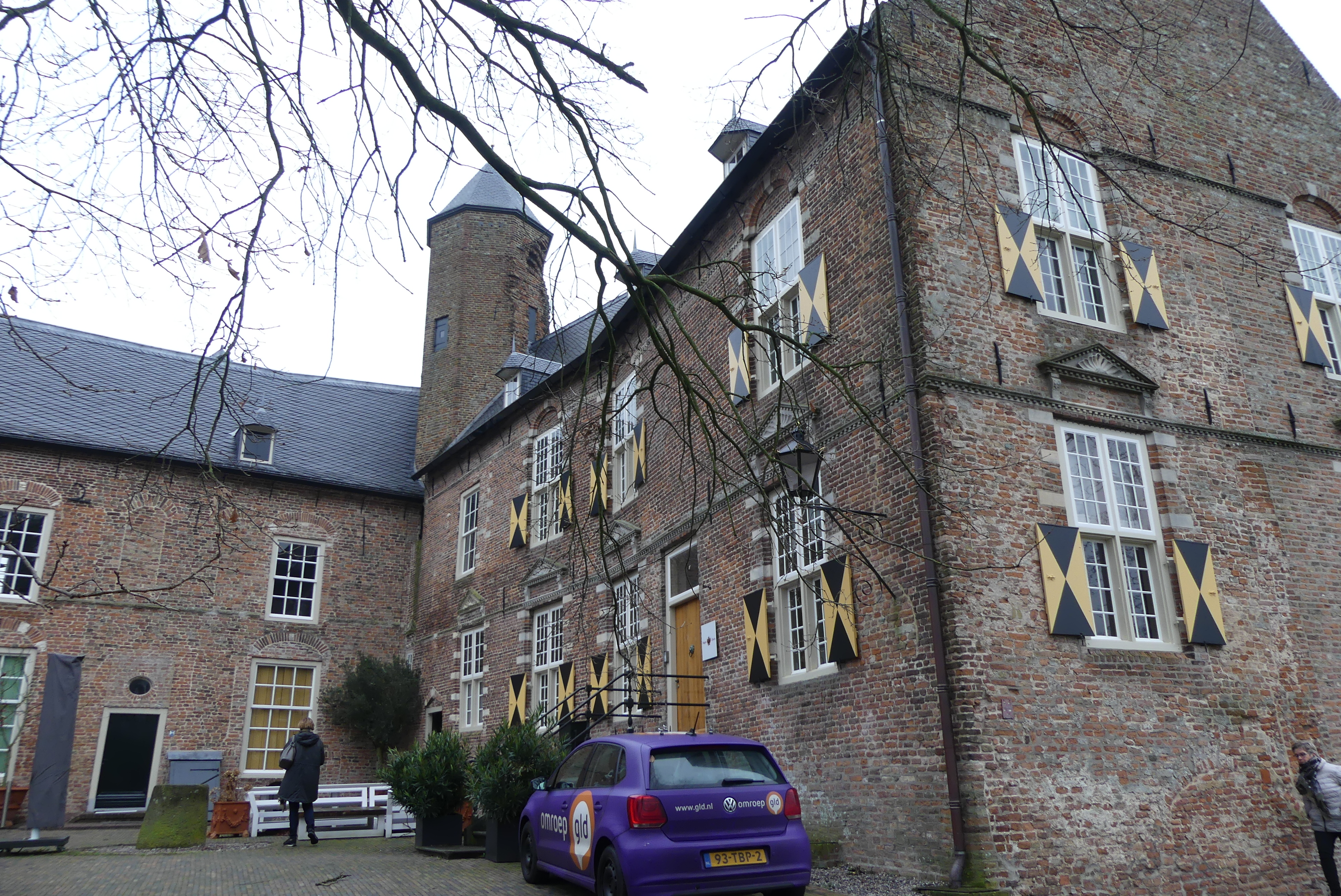 Zicht op een deel van het Kasteel Waardenburg in Waardenburg